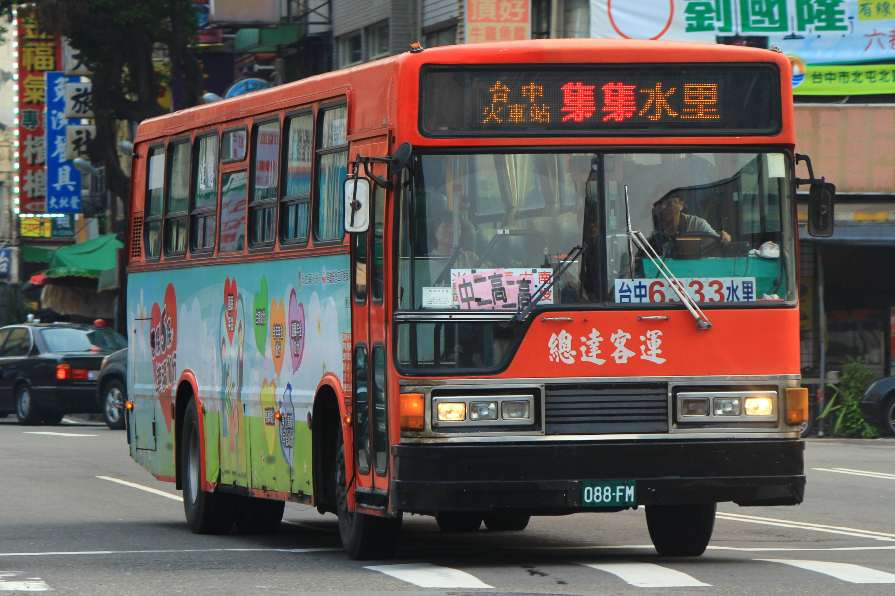 即將抵達干城站